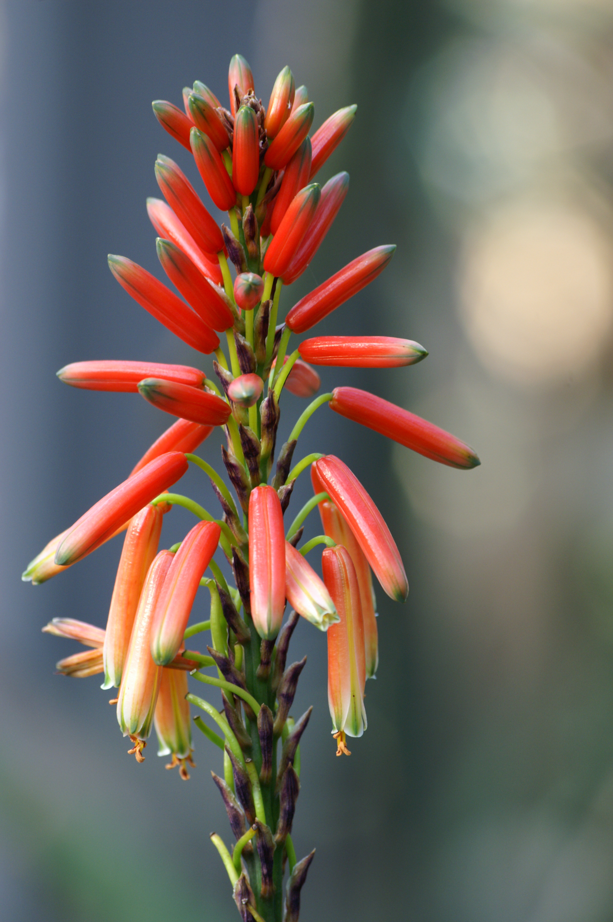 Berlin, Botanischer Garten, Blütenstand der Aloe succotrina, Heimat: Südafrika-Kapprovinz